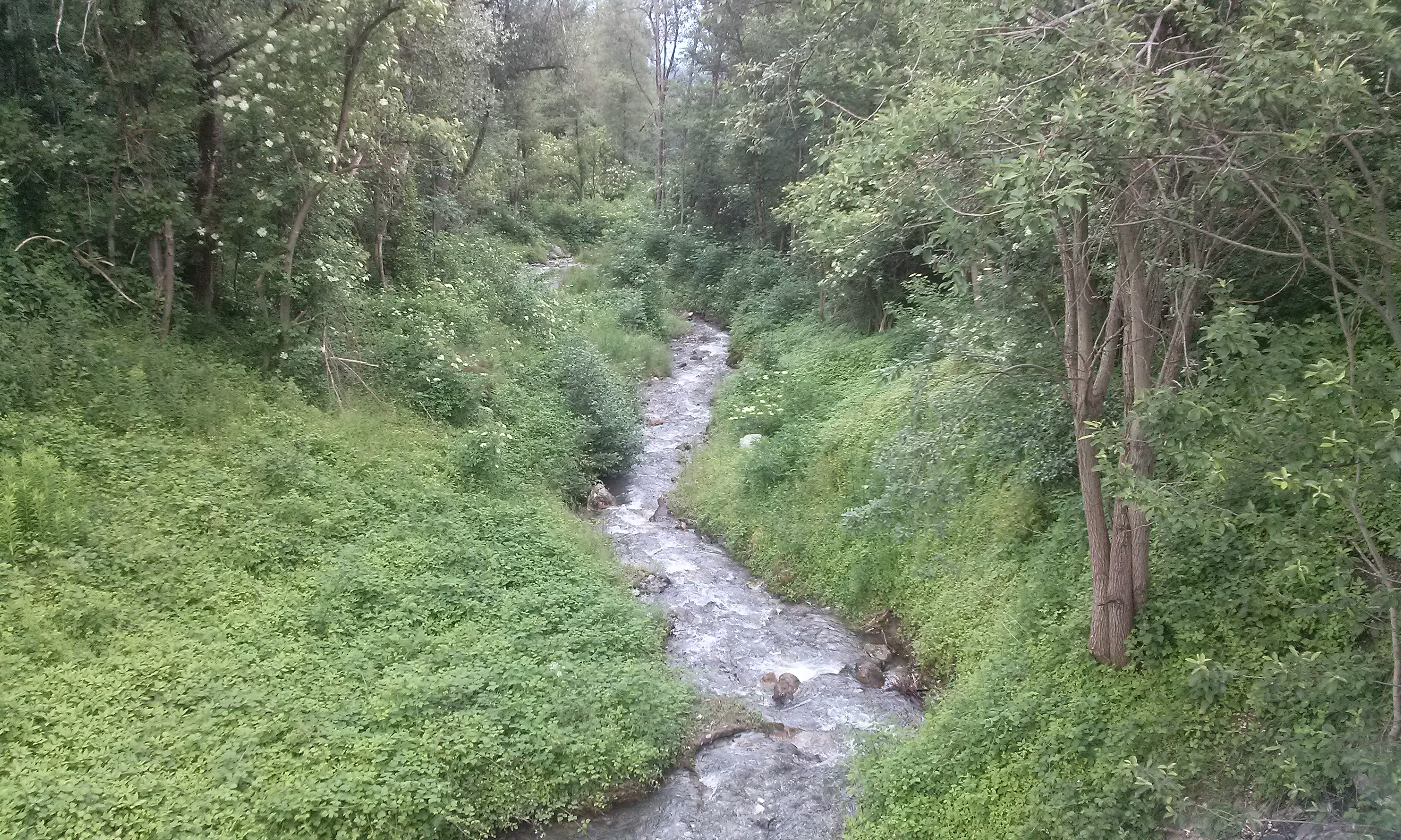 Geroldsbach flussabwärts Neu-Götzener Strasse